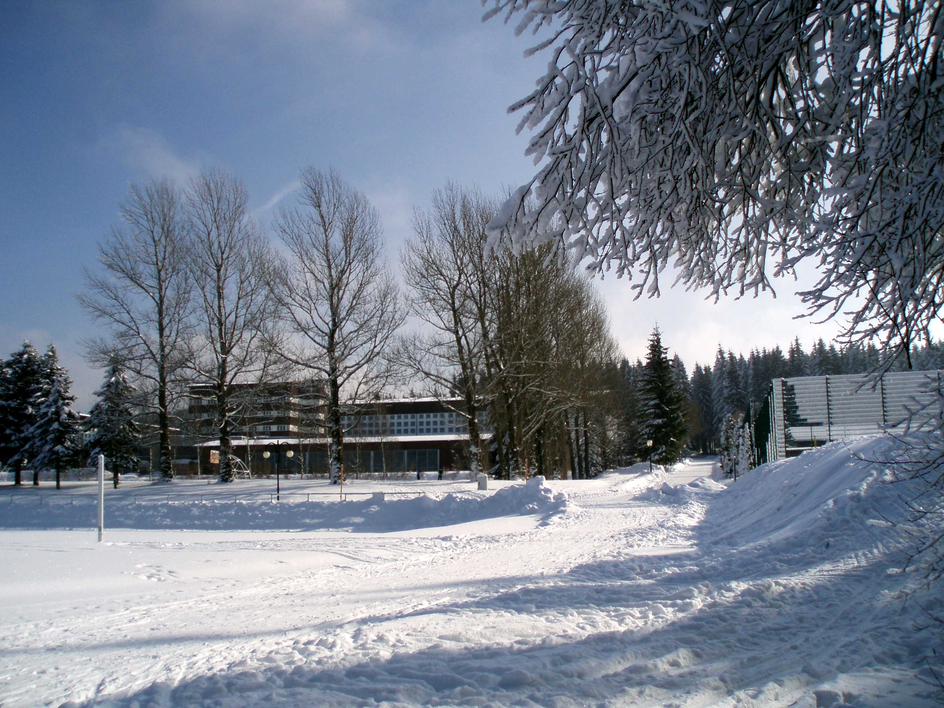 Sportschule Rabenberg (Erzgebirge)